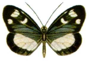 Tellervo zoilus gelo